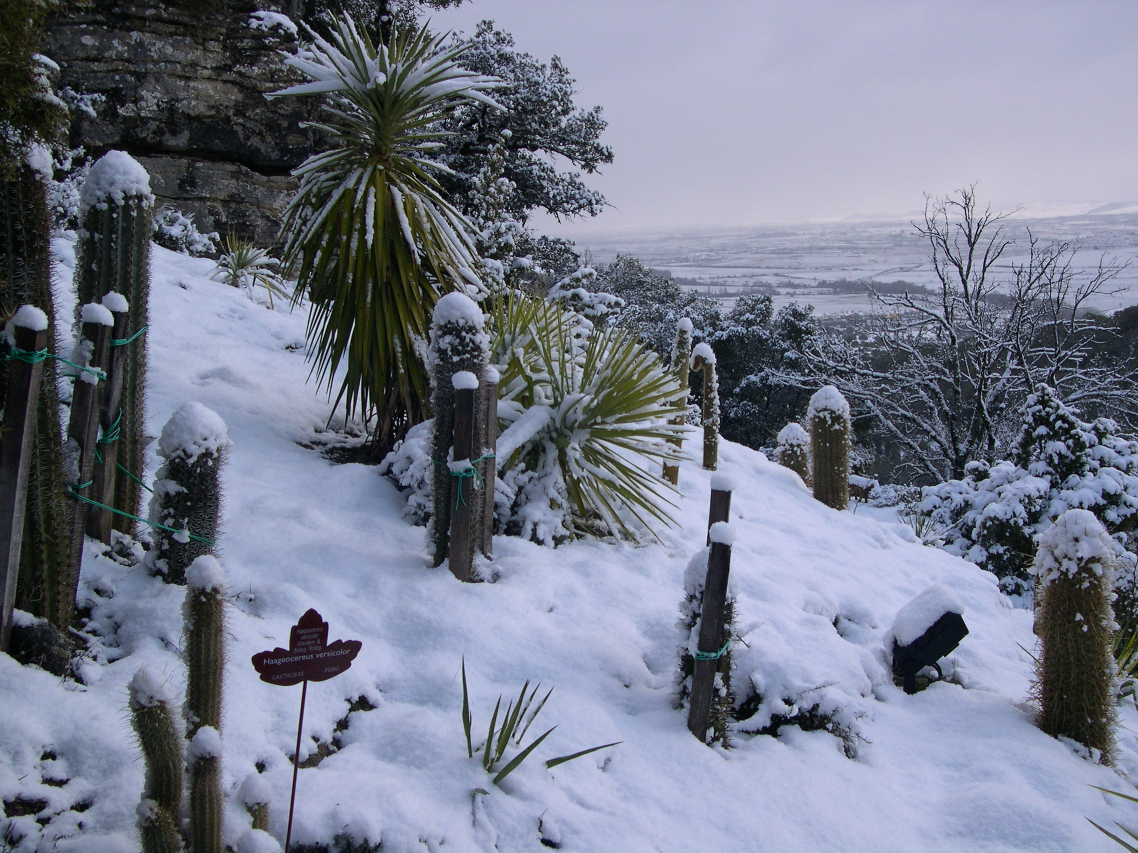 Colección de plantas suculentas en invierno